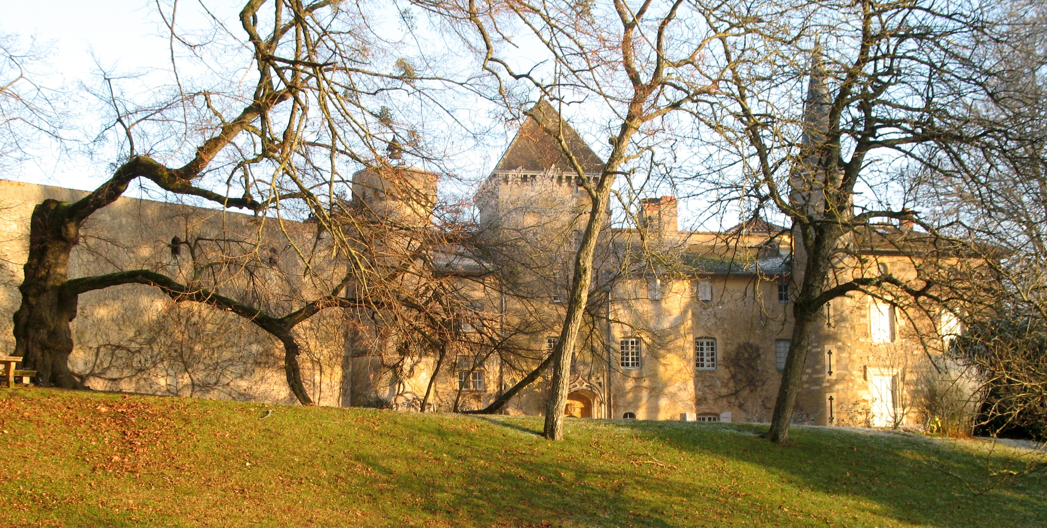 château de Saint-Point (Saône-et-Loire)